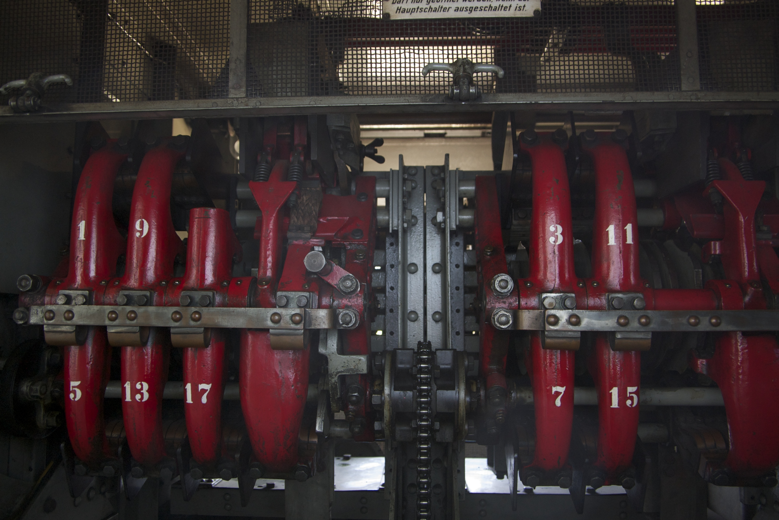 Stufenschalter der Lokomotive Ae 3/6II Nr. 10439 der Schweizerischen Bundesbahnen für 17 Fahrstufen.